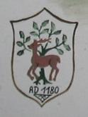 Kloster Lehnin, Symbol Otto I. Hirsch und Eiche aus Ottos Gründungstraum, Zeichnung im Dom. In stilisierter Form heute Wappen der Gemeinde Kloster Lehnin.